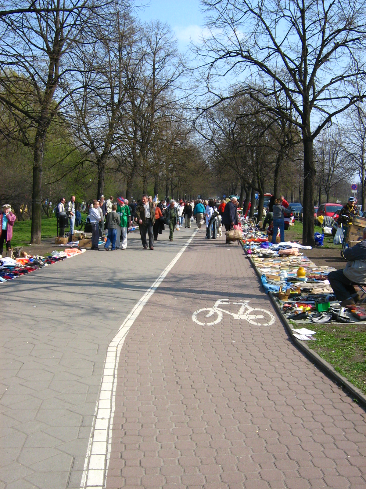 Bicycle path (ścieżka rowerowa), Na Niskich Łąkach, Wrocław, Poland